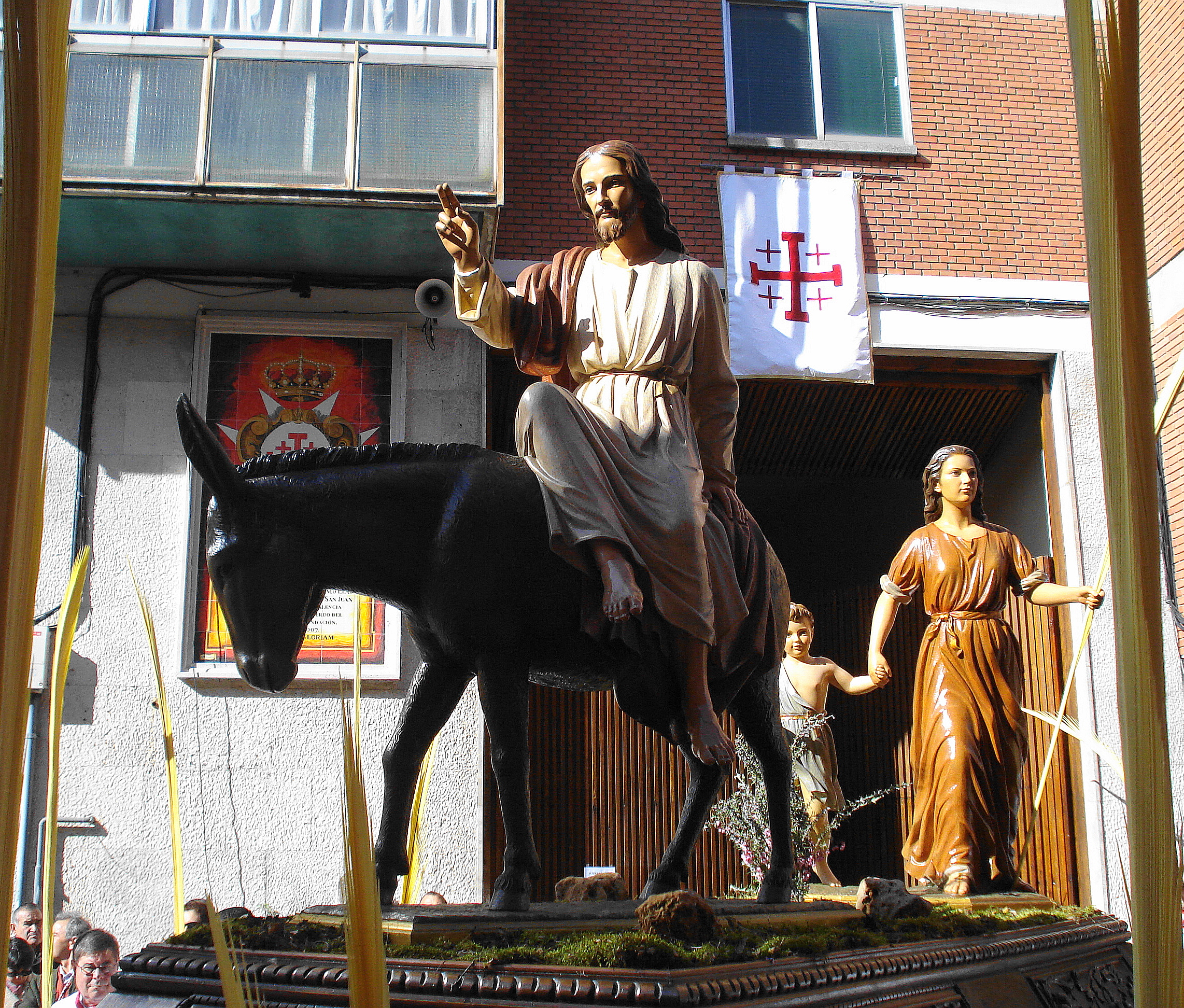 La Entrada de Jesús en Jerusalén saliendo en Palencia